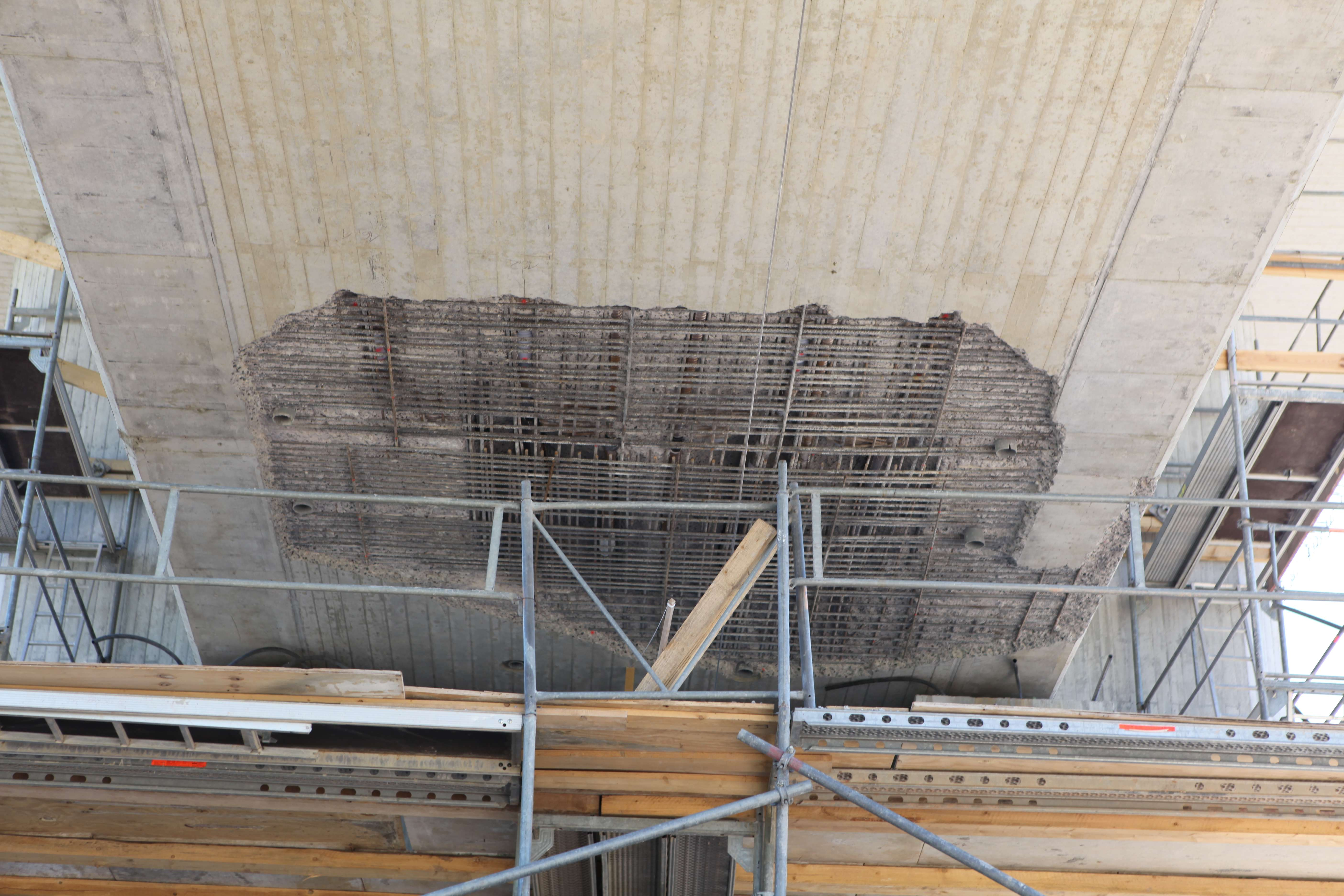 Ilmtalbrücke bei Langewiesen in Thüringen; Bodenplatte aufgestemmt zwecks Sanierung